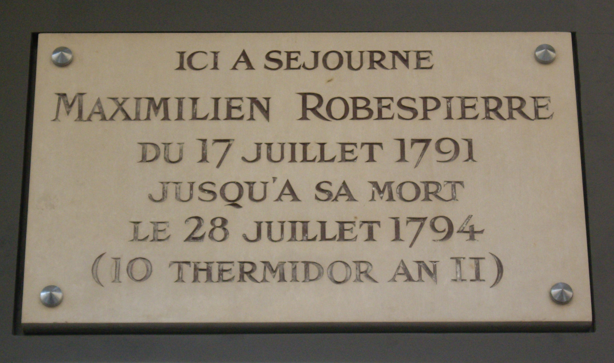 Plaque apposée au n° 398 de la rue de Saint-Honoré, Paris 1er.« Ici a séjourné Maximilien Robespierre du 17 juillet 1791 jusqu'à sa mort le 28 juillet 1794 (10 thermidor an II). »